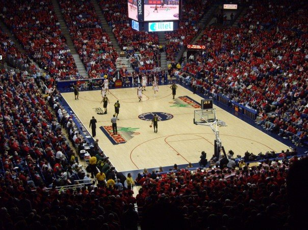 UA-UO Basketball Game